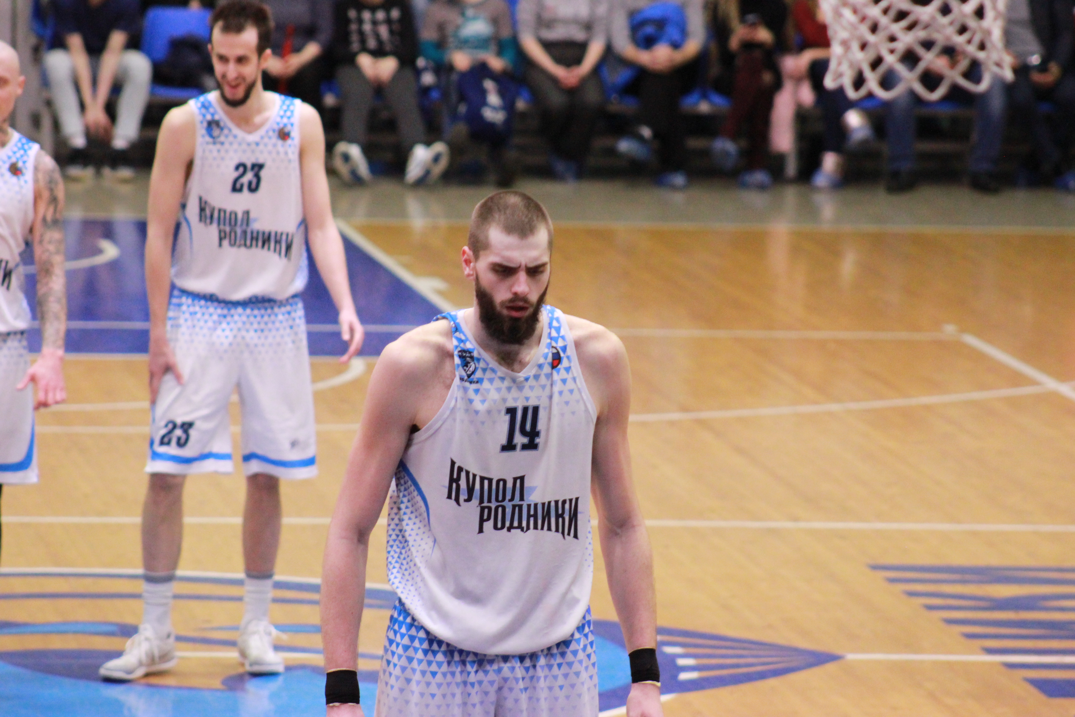 Центровой БК Купол-Родники Евгений Минченко в матче регулярного чемпионата Суперлиги БК Купол-Родники против БК Урал 14 марта 2019 года